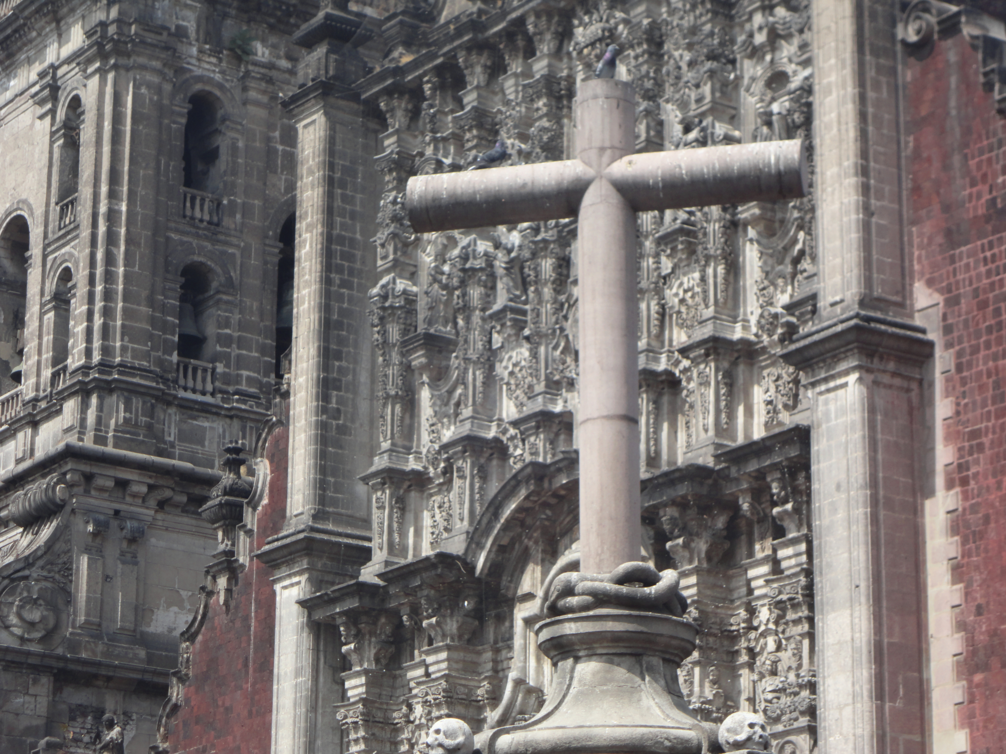 Cruz atrial de la Catedral Metropolitana de la Ciudad de México.